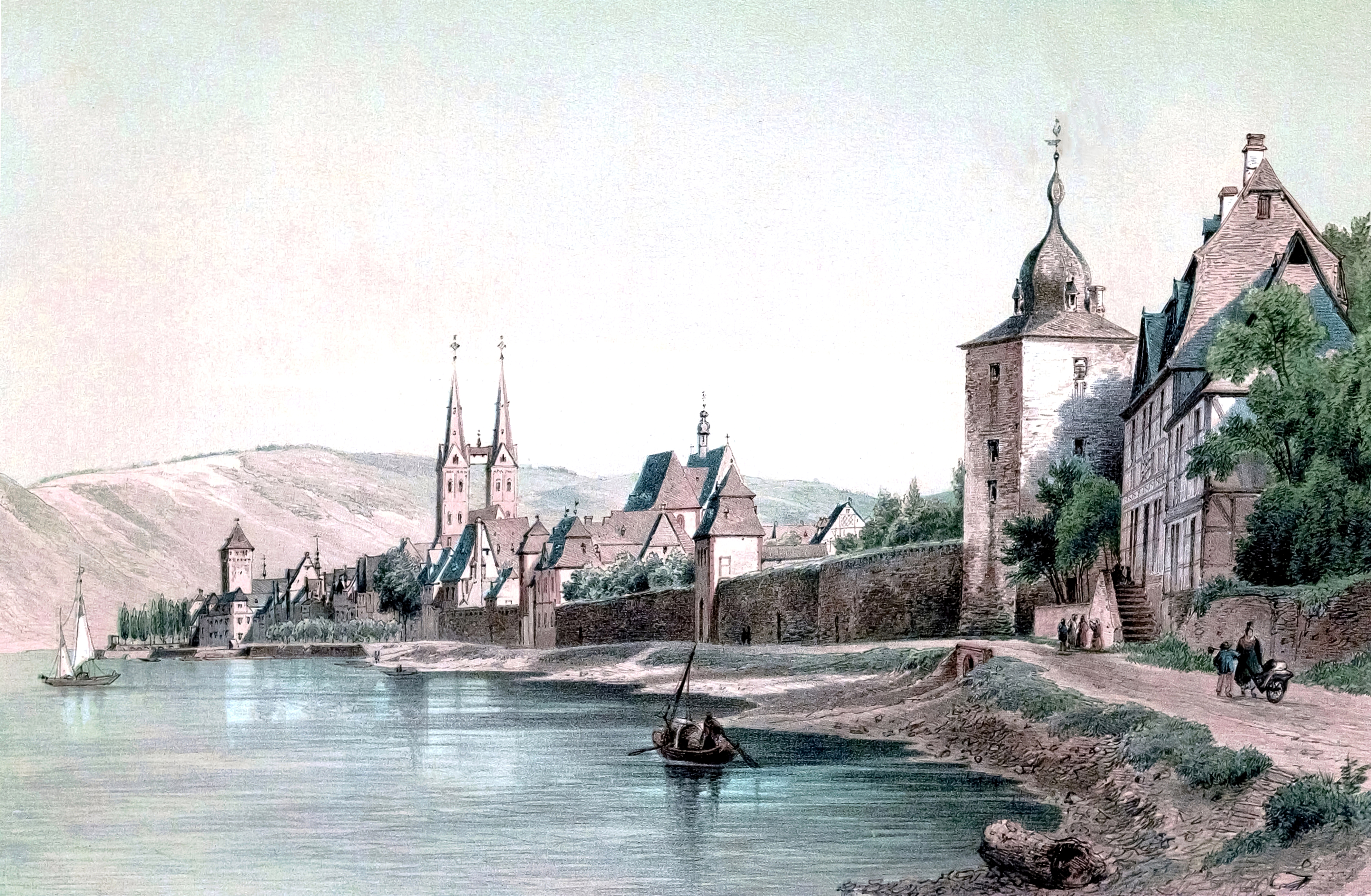 Stadtansicht von Boppard von Nordwesten aus dem Jahr 1856